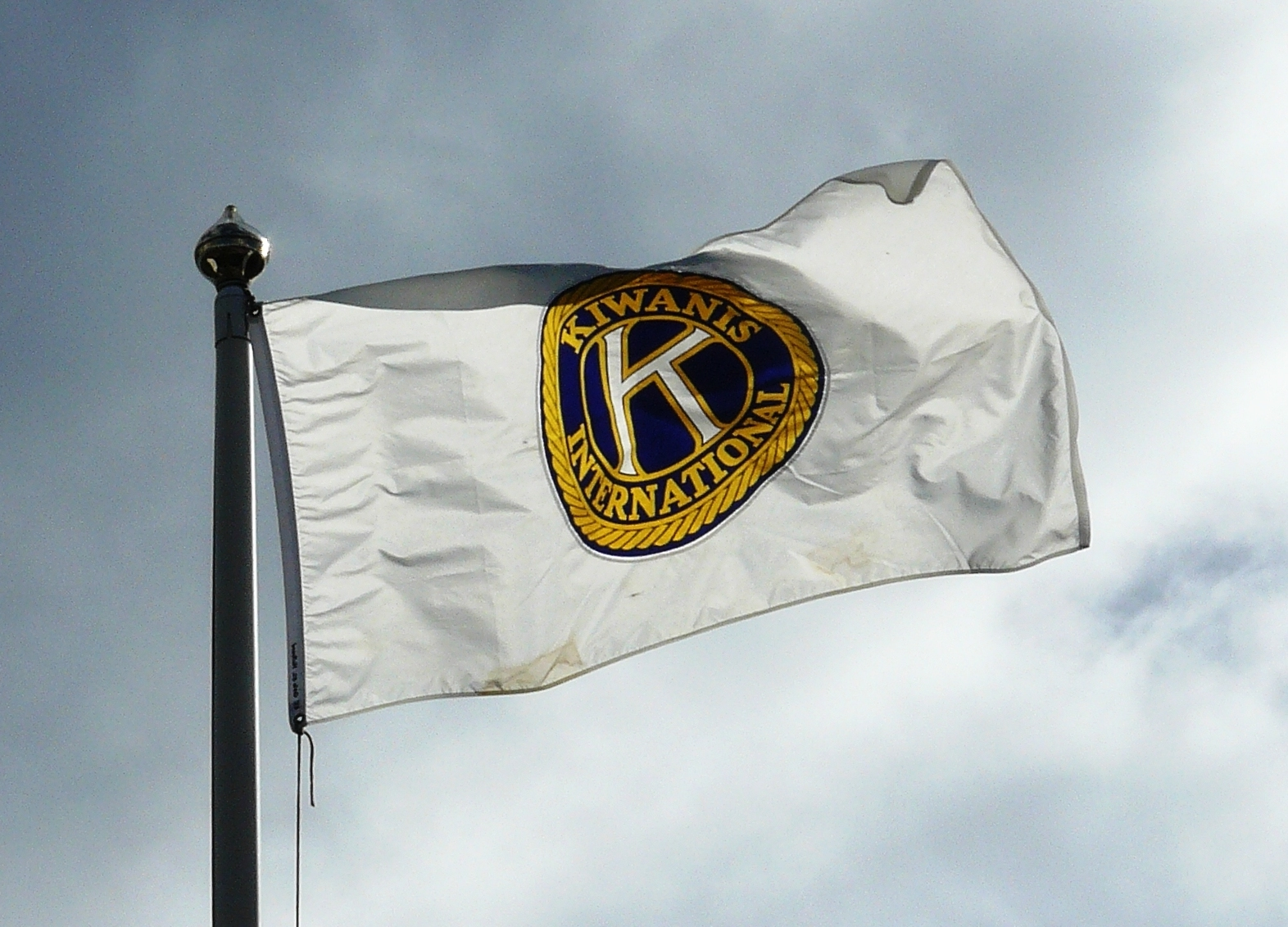 Kiwanis